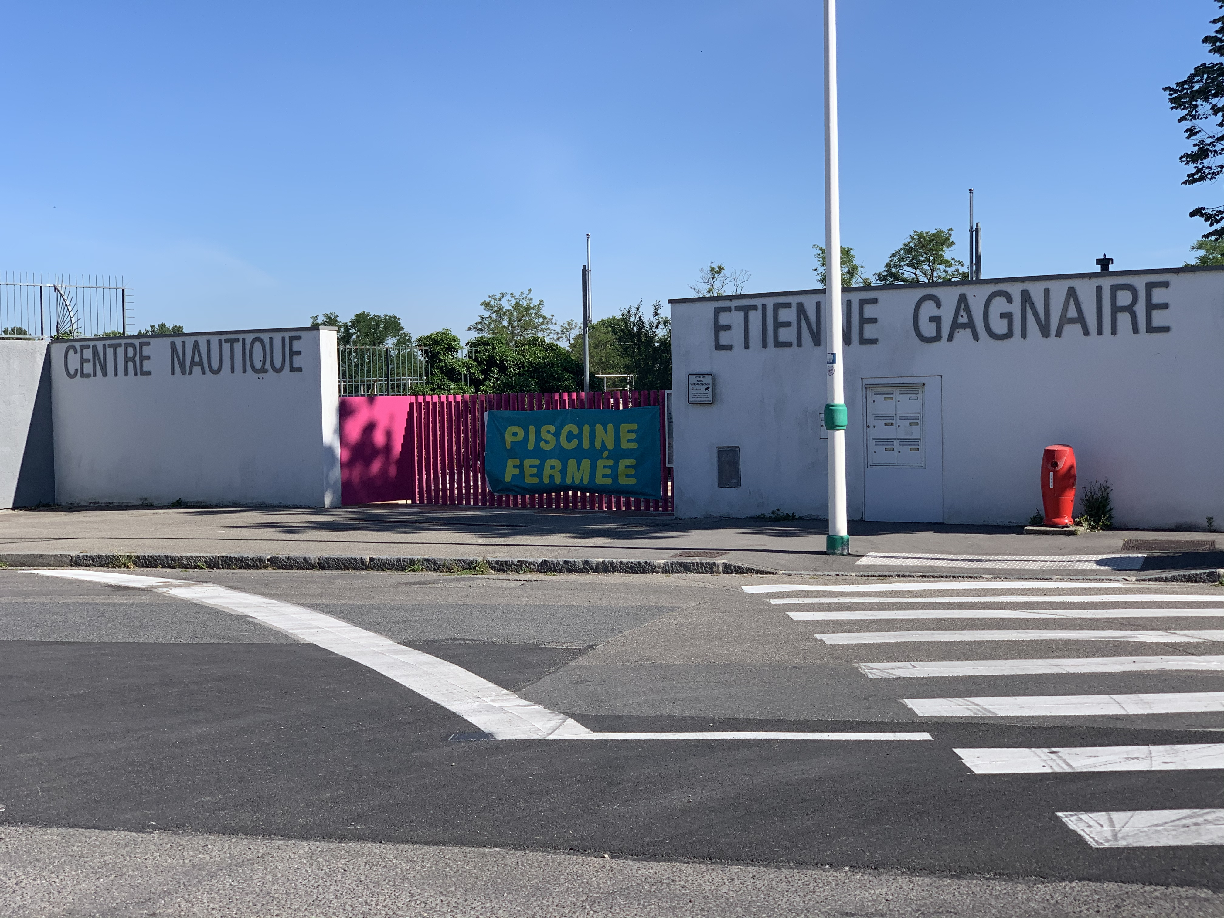 Centre nautique Étienne Gagnaire (Villeurbanne) fermé pour cause de virus (mai 2020).